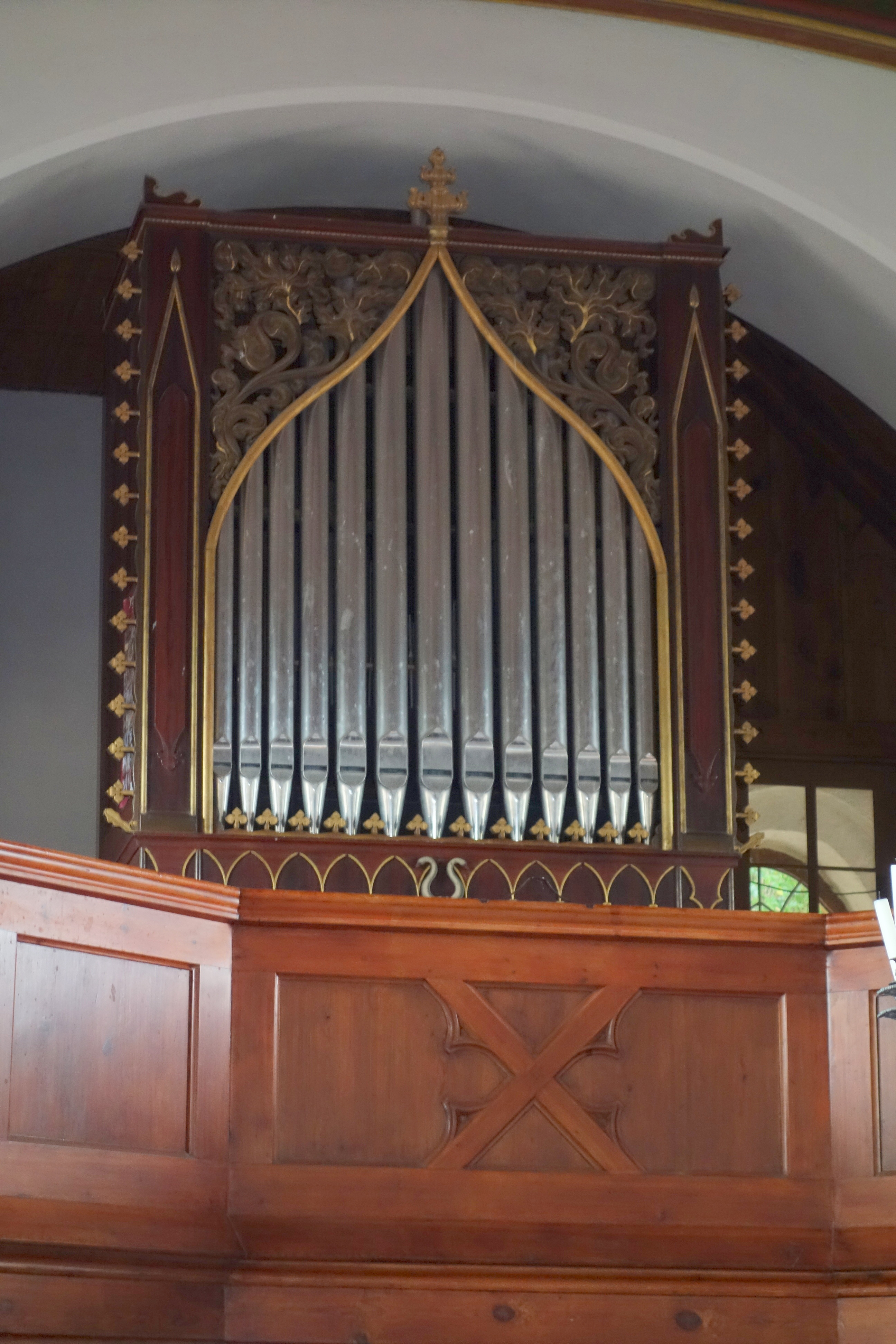 Dorfkirche Pokrent, Landkreis Nordwestmecklenburg, Mecklenburg-Vorpommern, Deutschland